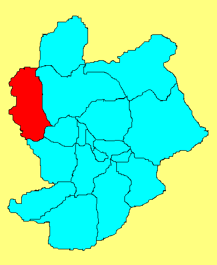 尚义县在张家口市的位置；此图片由王云峰wangyunfeng原创，用于WIKI。